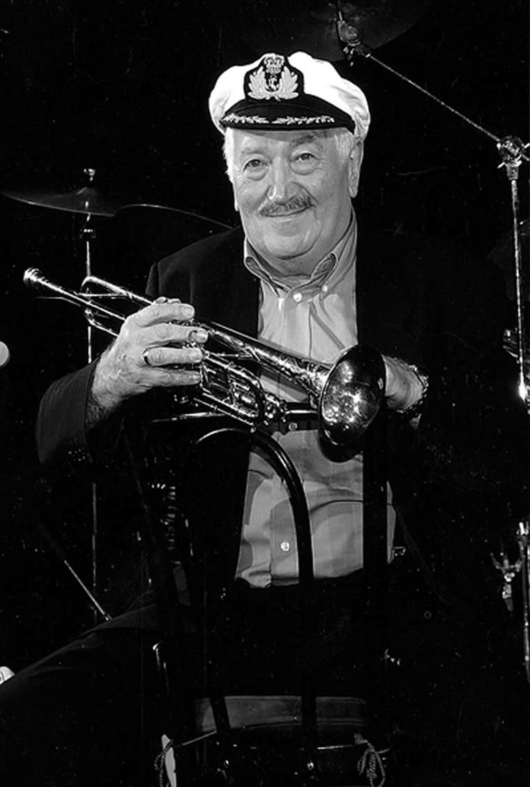 Offizielles Pressefoto von Oscar Klein 2004